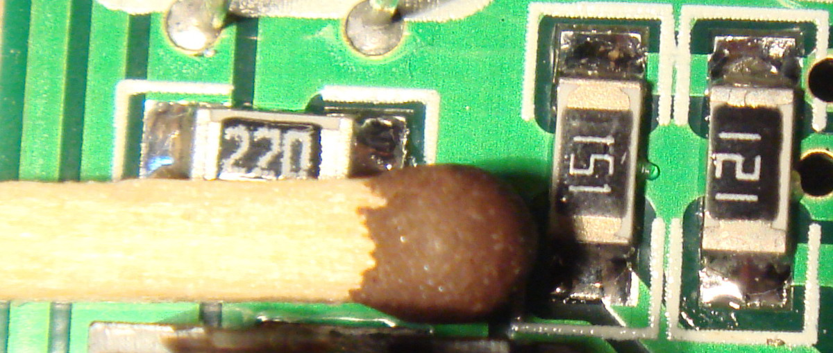 SMD резисторы со спичкой